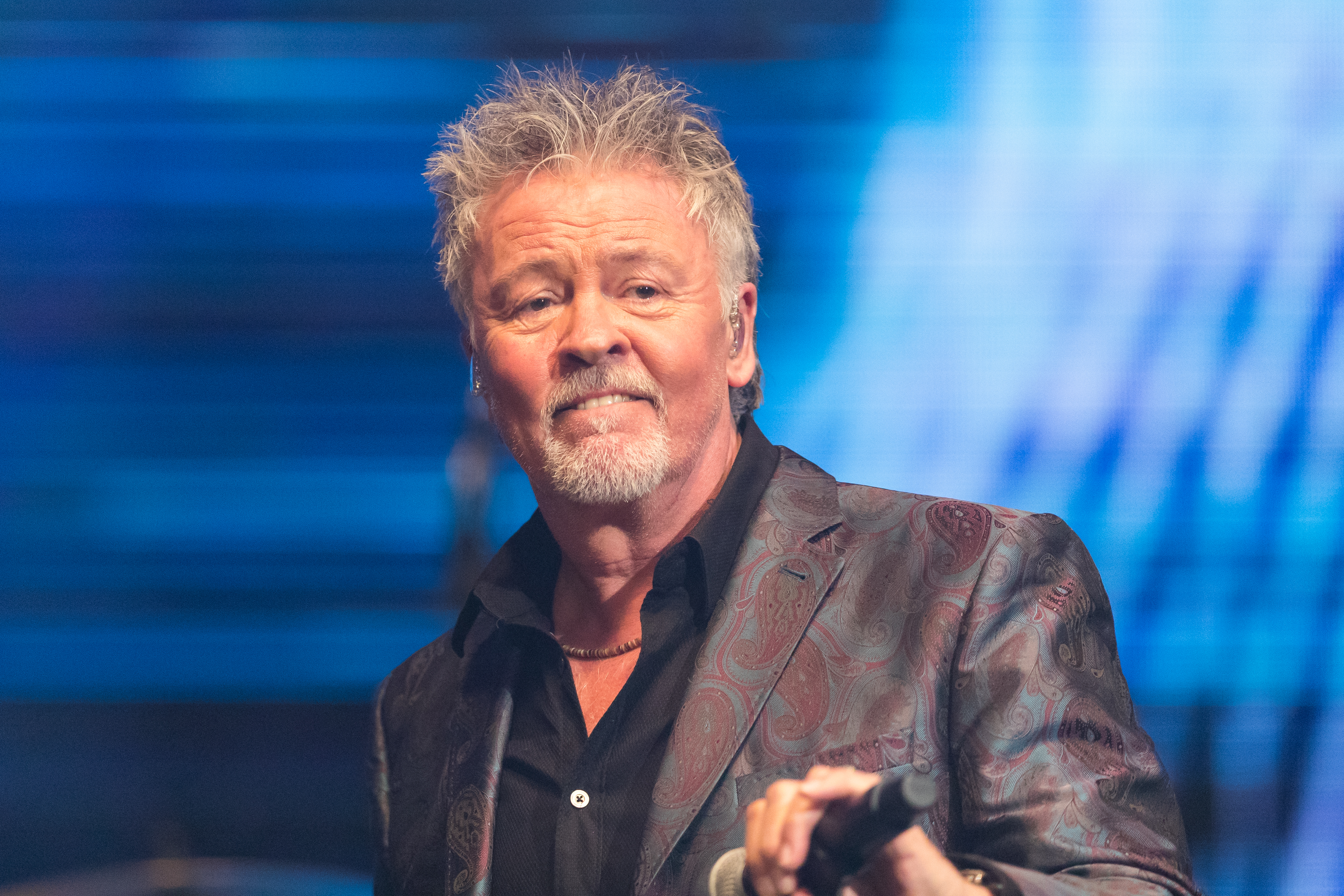 Paul Young during 30 Jahre Radio Regenbogen at SAP Arena, Mannheim, Mannheim, Germany on 2018-04-21, Photo: Sven Mandel